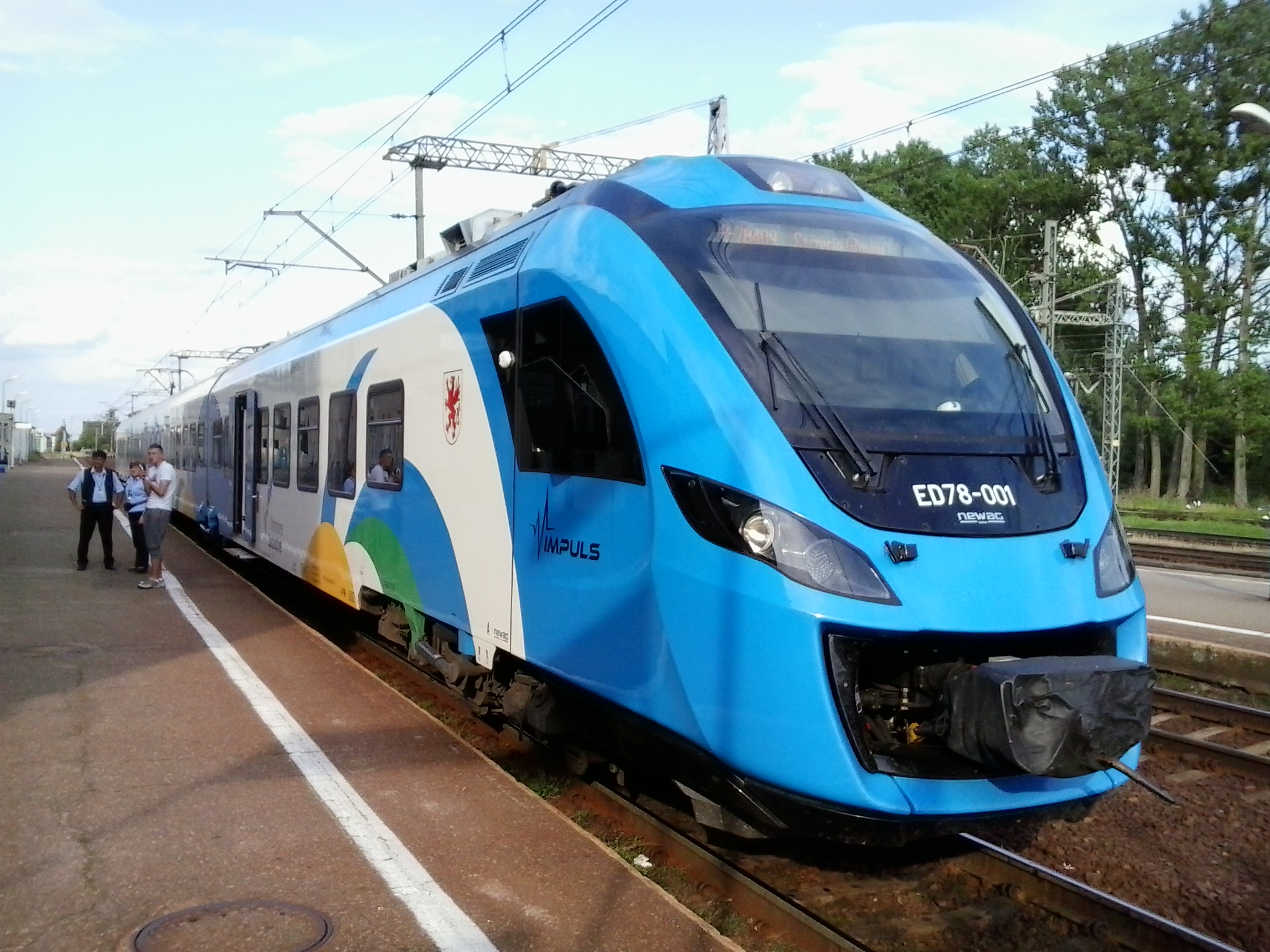 Krzyż. ED78-001.